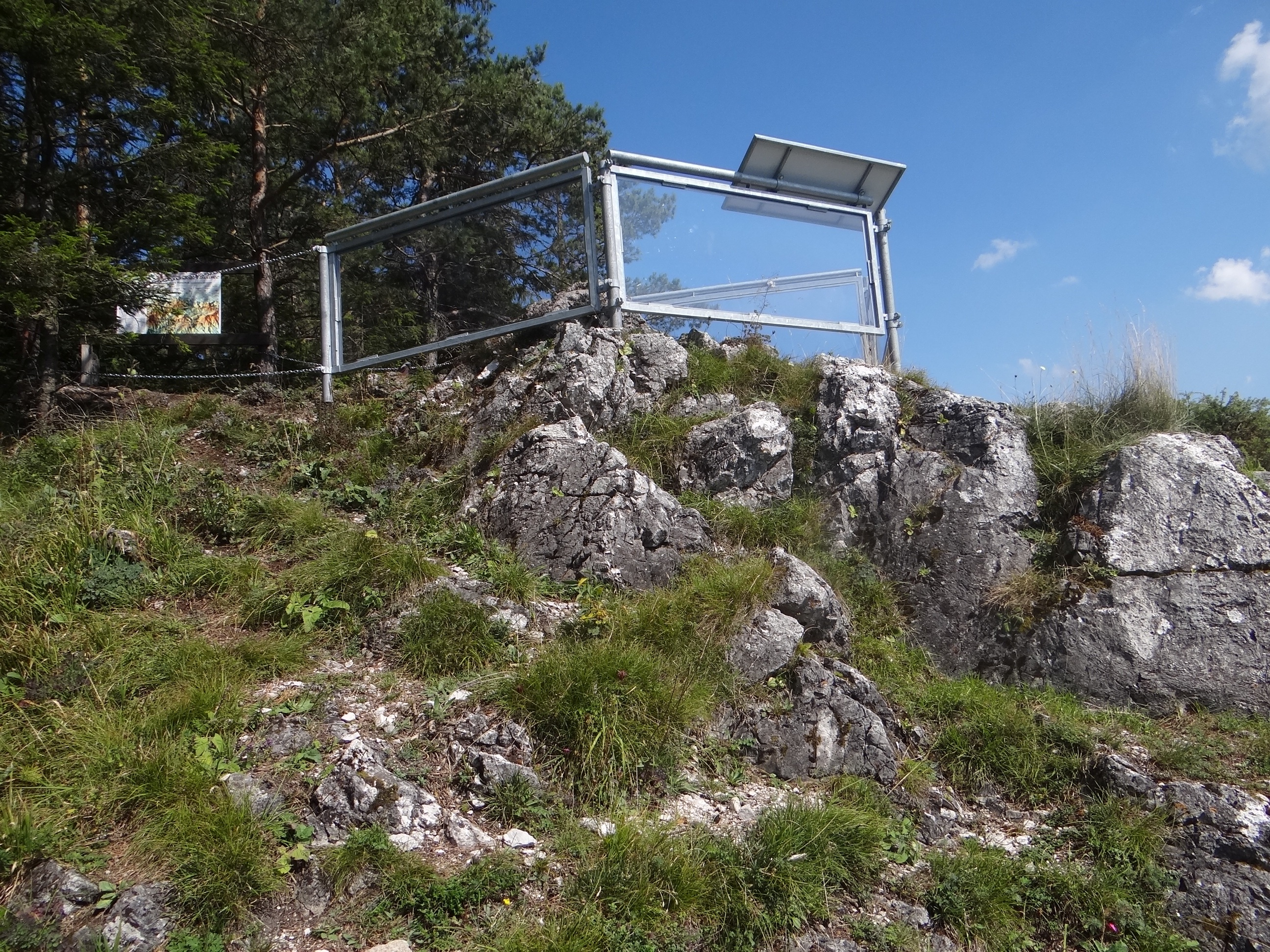 Sidorovo